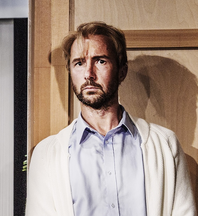 Olle Sarri i pjäsen Direktören för det hela på Malmö Stadsteater.